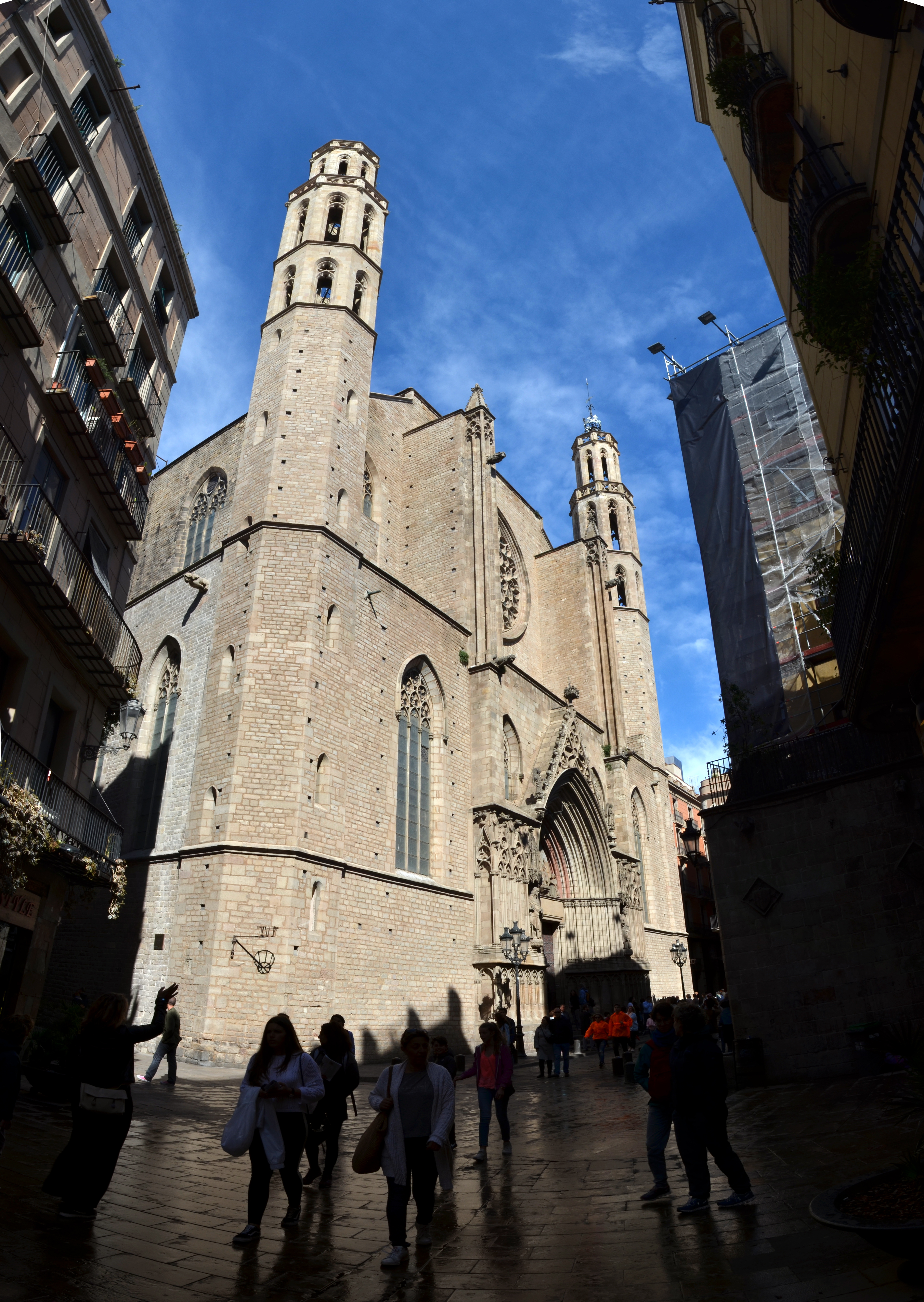 Basílica de Santa Maria del Mar, Barcelona.